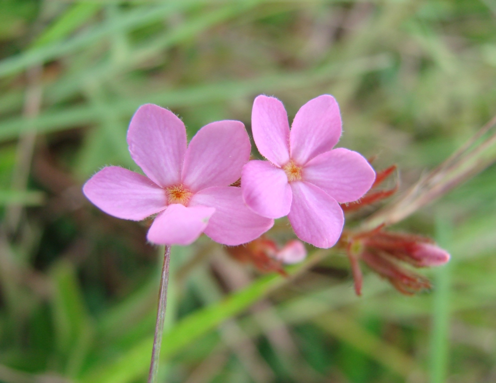 Sipanea hispida - RUBIACEAE Parque Vivencial II Lago Norte - Brasília - Distrito Federal - Brasil.